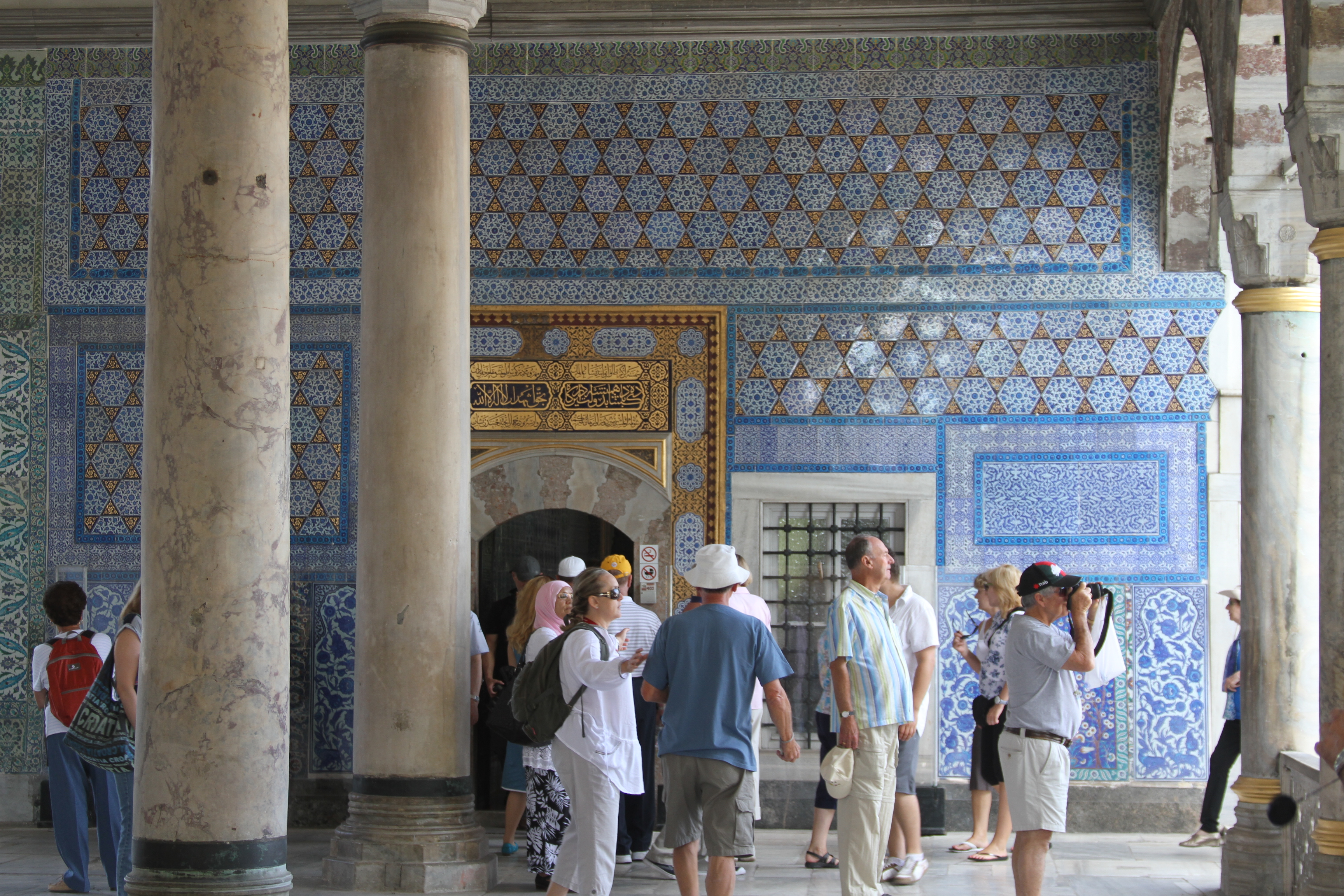 Entrada da Câmara de Circuncisão, no Palácio Topkapi